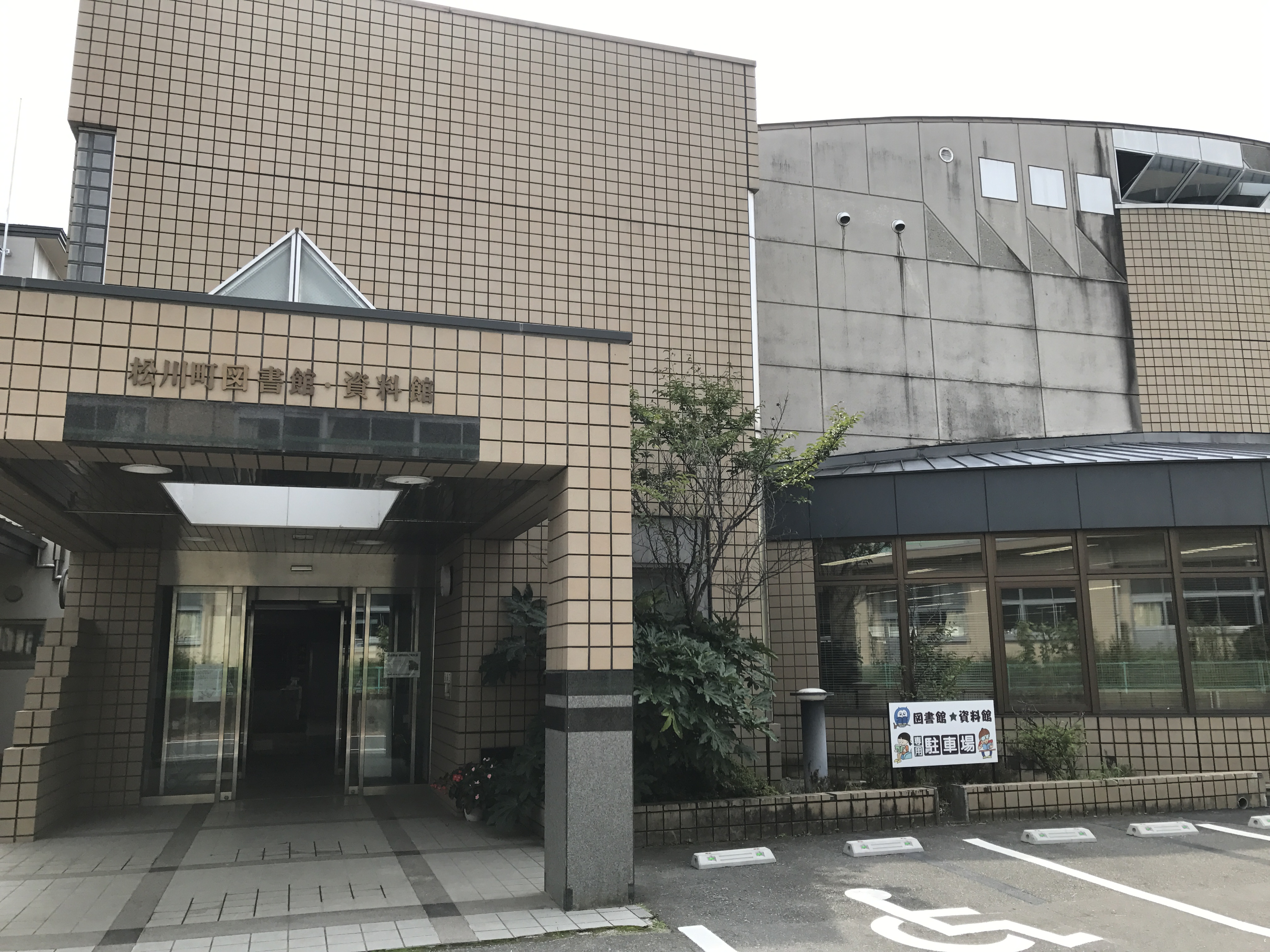 長野県松川町図書館外観